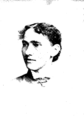 Portrait of Corinna Shattuck, in: Outlook for the Blind 4 (1910), p. 105